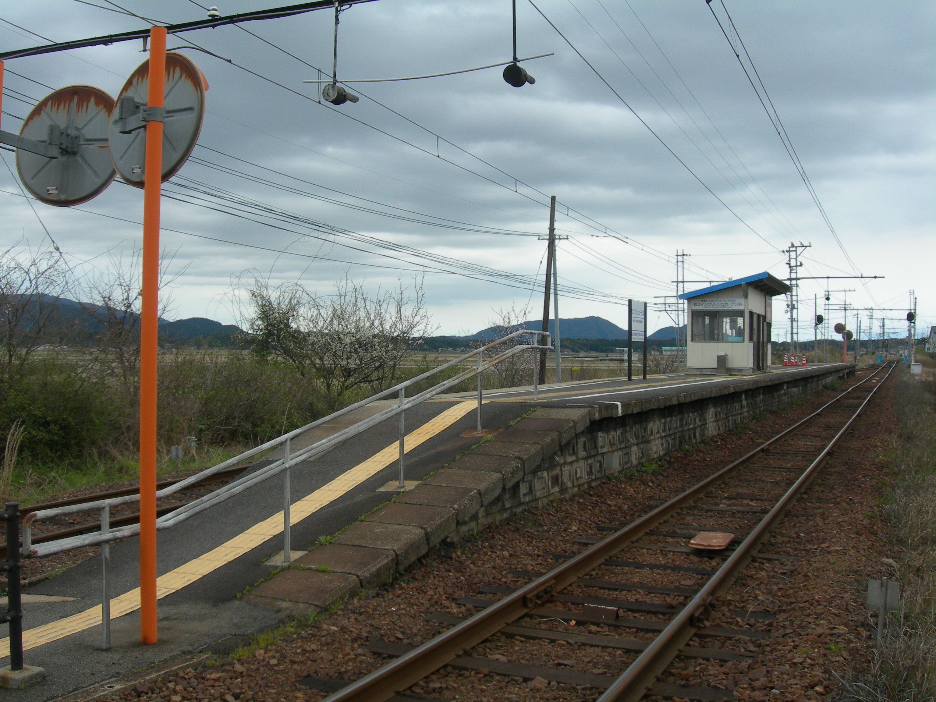 松江イングリッシュガーデン前駅プラットホーム